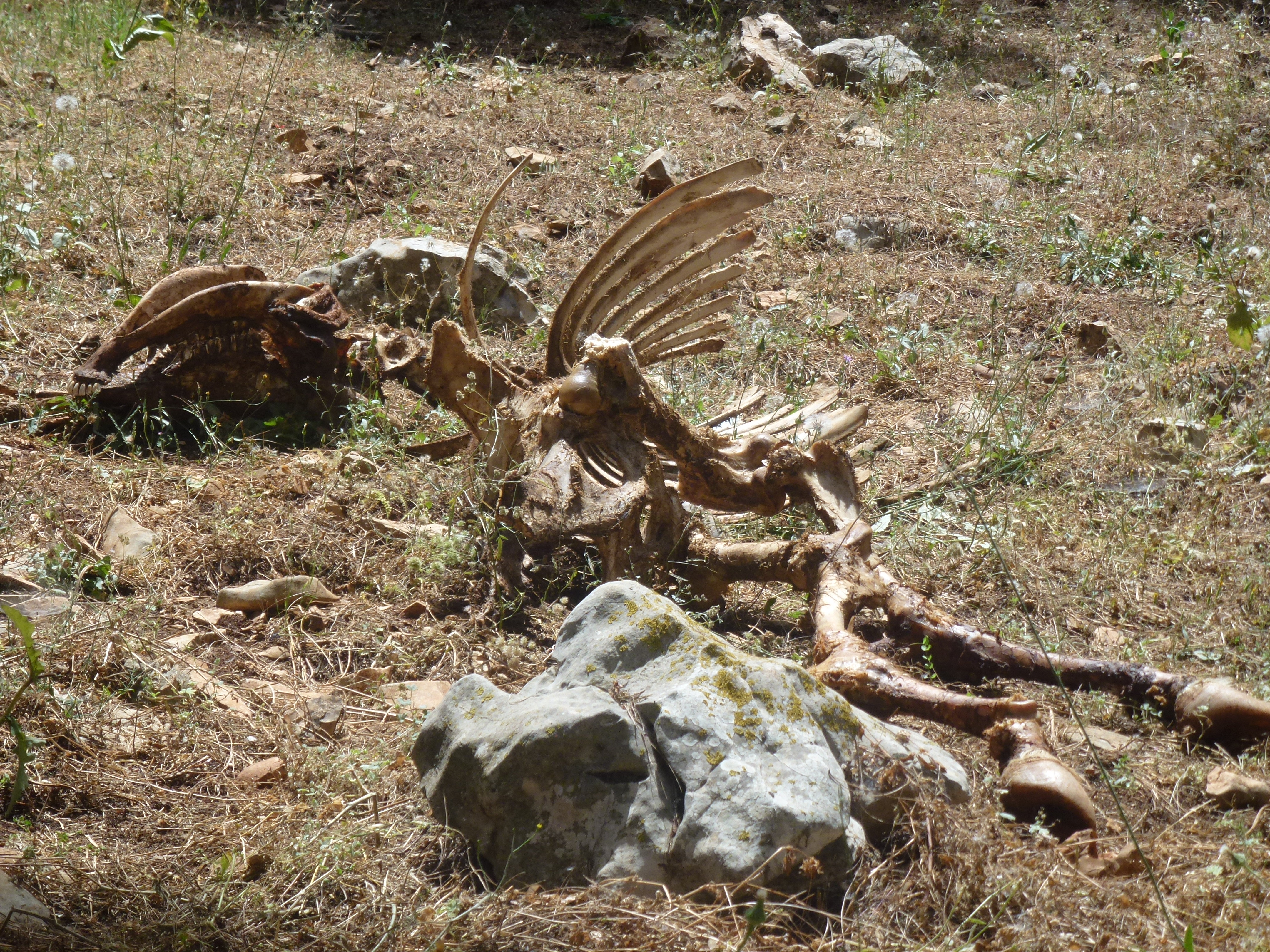 זהו תמונה שצילמתי בטיול: בתמונה רואים פגר של פרה מתה שרוב הבשר נאכל ממנה והשלד נשאר